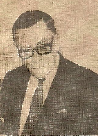 Senador